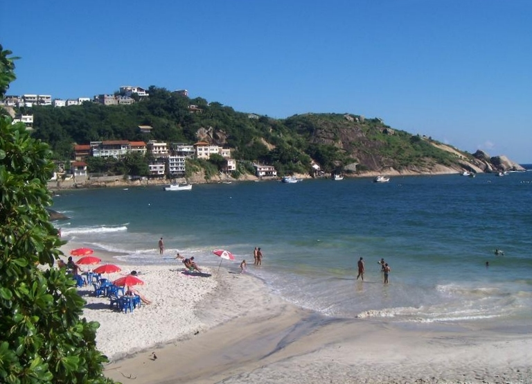 Praia Grande- Barra de Guaratiba-RJ